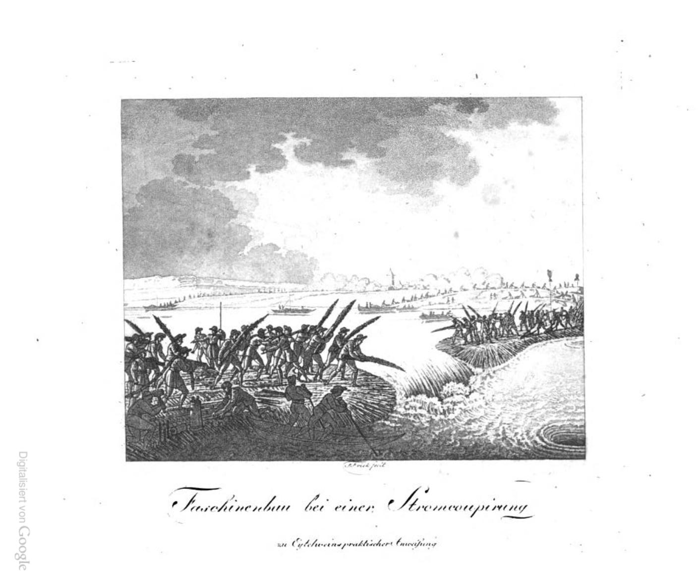 Bekämpfung eines Deichbruchs durch Einbringen von Faschinen